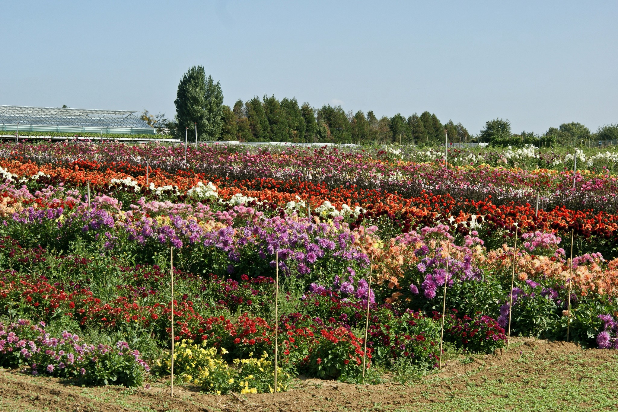 Pépinière à Rungis.